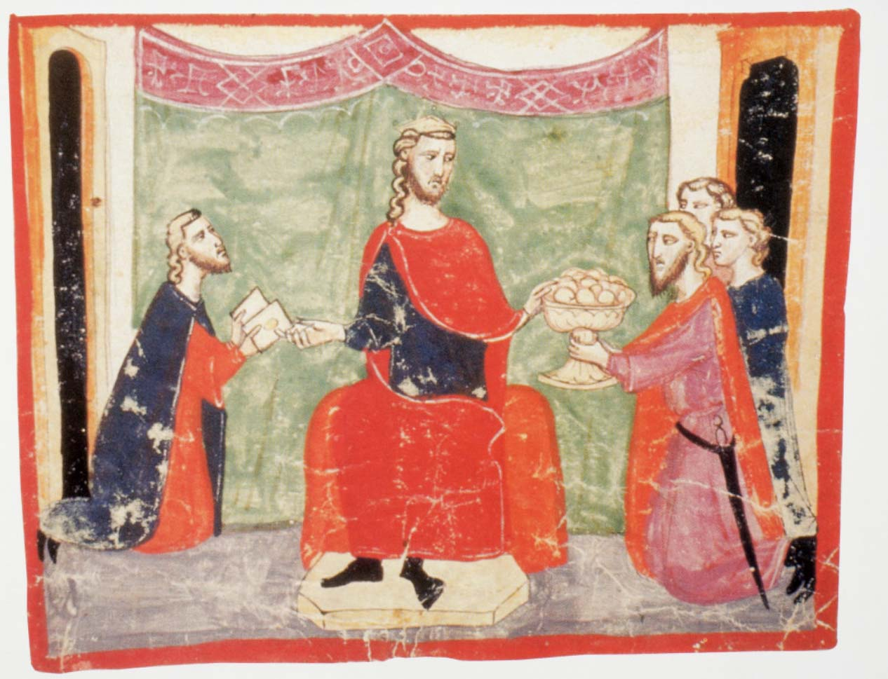 Nuova cronica. f.123r (1.VIII,59) ms. Chigiano L VIII 296. Pere III d'Aragó rep els ambaixadors de l’emperador Frederic II de Sicília i de l’emperador bizantí Miquel VIII, per convèncer al rei d’intervenir en la guerra contra Carles d’Anjou.